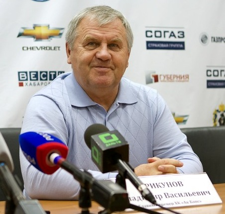 Владимир Крикунов на пресс-конференции после матча КХЛ «Амур» — «Ак Барс» 28 сентября 2011 года